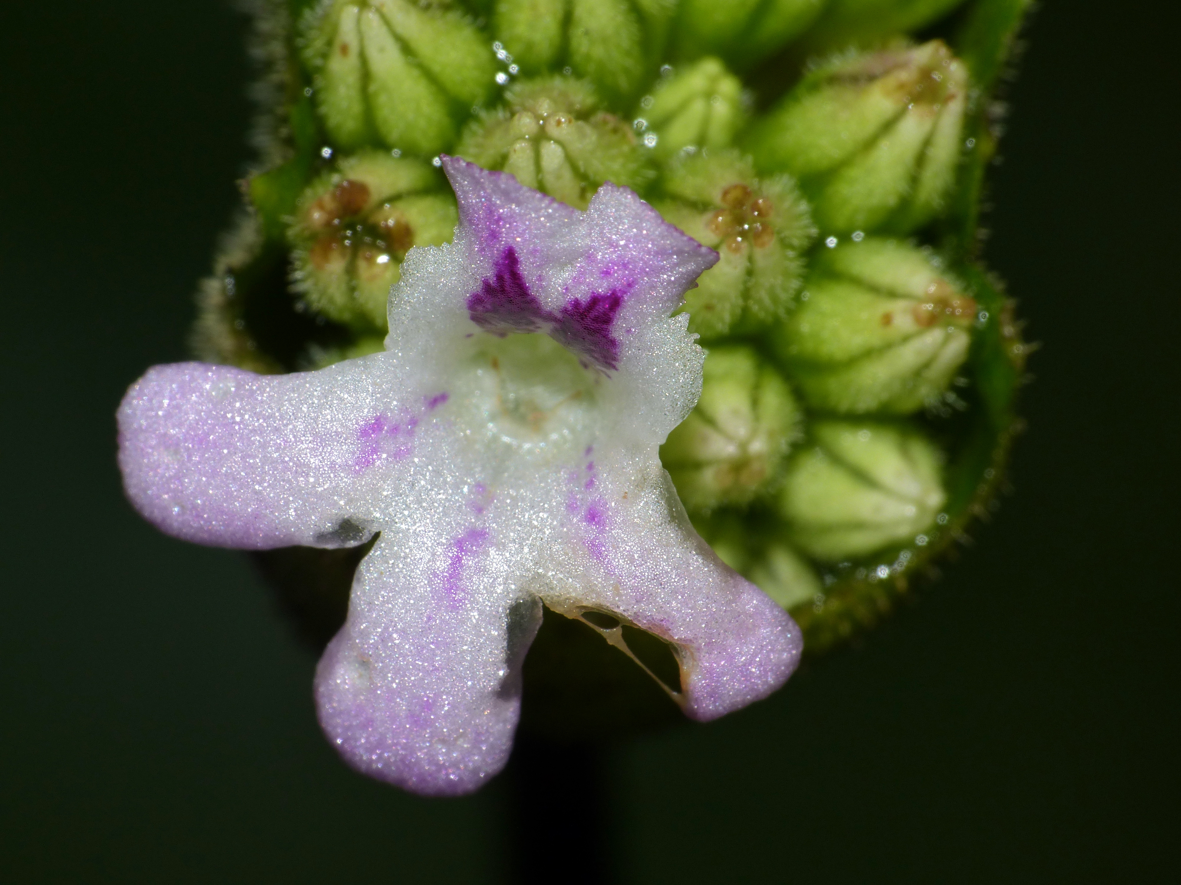 Deer Cave Boardwalk, Mulu NP, Sarawak, MALAYSIA